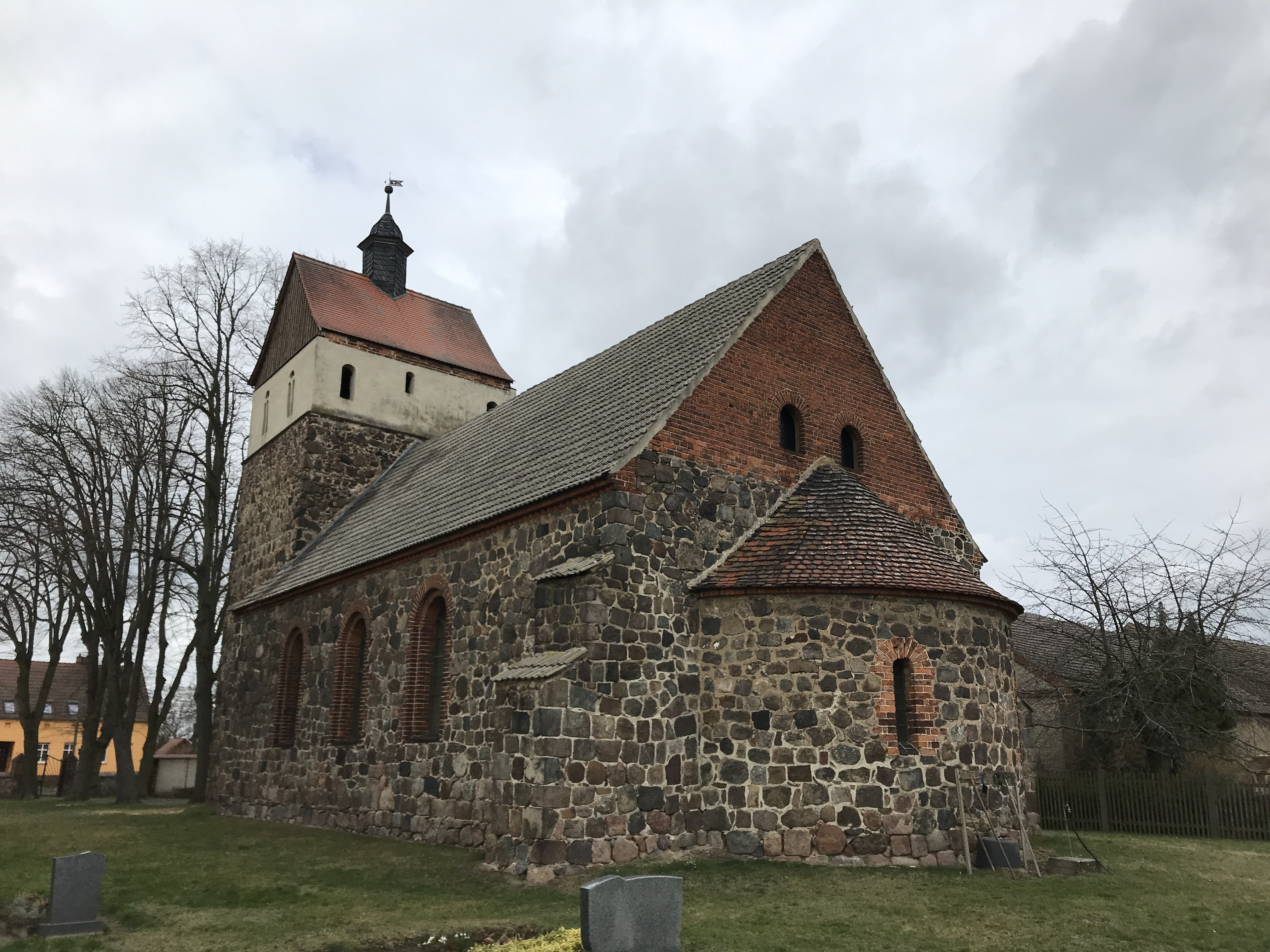 Spätromanische Feldsteinkirche in Körbitz, Gemeinde Niederer Fläming in Brandenburg